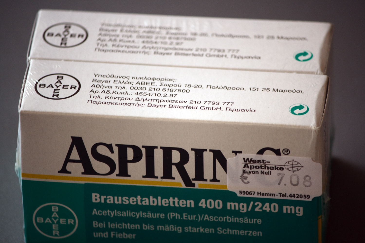 Gekauft in Deutschland, Datum/Uhrzeit: 30.04.2009 18:54:18